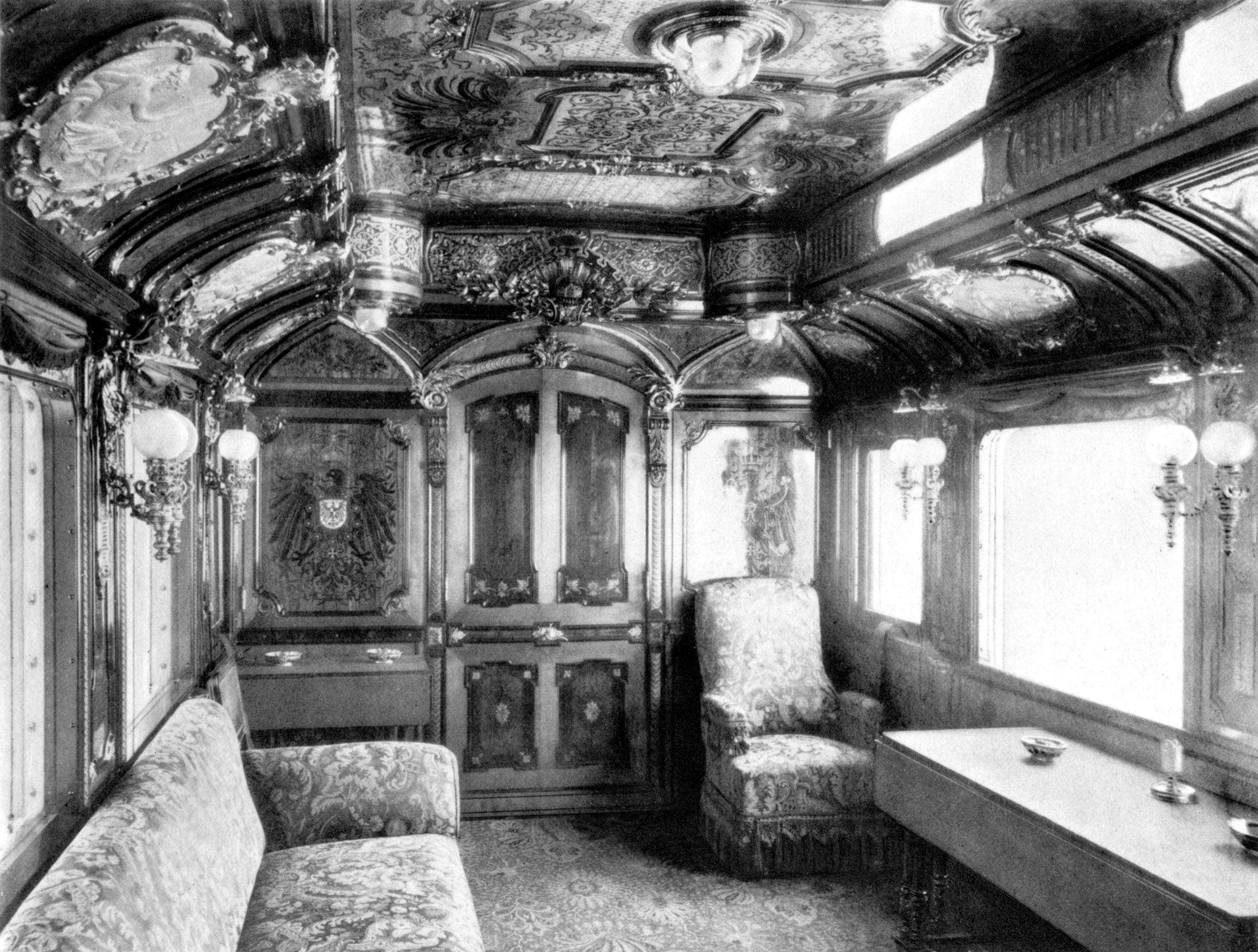 Salonwagen des Kaisers Wilhelm II.